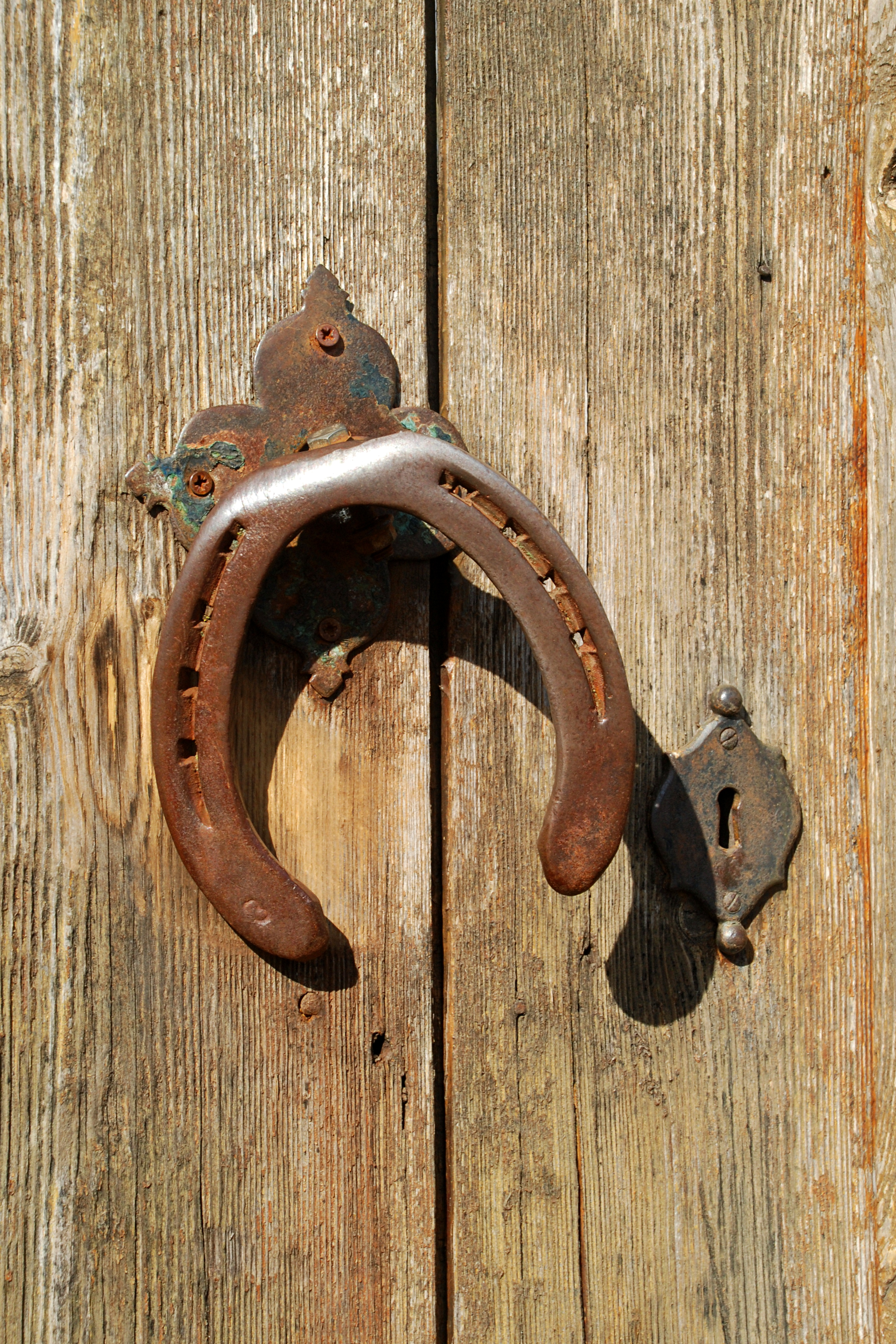 Belgique - Brabant wallon - Ottignies - Manoir de Franquenies